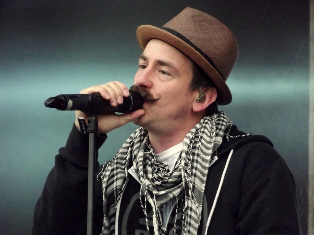 Zdjęcie zrobione podczas pierwszego dnia czwartej edycji Life Festival 2013 w Oświęcimiu.